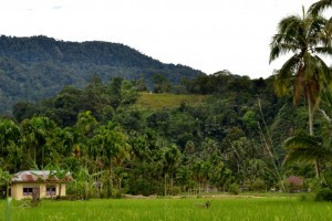 Minangkabau: Benteng iko talatak di ateh bukik. Untuk mancapainyo ditampuah malalui jalan di balakang Kantor Wali Nagari Ganggo Hilir, Jalan Pasar Ganggo Hilir no. 7, Kecamatan Bonjol, Pasaman, Provinsi Sumatera Barat. Benteng iko marupokan bukik nan masyarakat disitu disabuik sabagai Bukik Takjadi. Di sapanjang jalan manuju lokasi benteng nampak babarapo makam, di antaranyo adalah makam Inyiak Son Sangbulu nan marupokan pangikuik Tuanku Imam Bonjol. Benteng pertahanan Imam Bonjol hanyo barupo sabuah bukik nan bafungsi untuk mangawasi daerah sakitarnyo (Bonjol). Malalui bukit tersebut pandangan akan laluaso mangawasi daerah Bonjol dan sekitarnyo. Di lokasi tasabuik indak ditemukan struktur bangunan yang mengindikasikan sebuah bangunan pertahanan. Pada masa belakangan di lokasi benteng berada didirikan monumen untuk mengenang perjuangan Tuanku Imam Bonjol. ini, pada bagian puncak dari Benteng Bukit Takjadi tersebut dibangun sebuah tugu berwarna putih yang terlihat dari jalan raya.